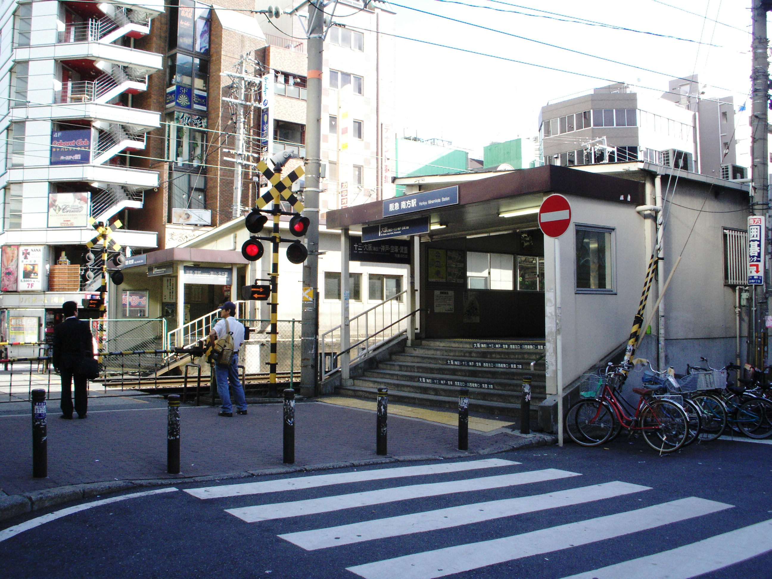 南方駅